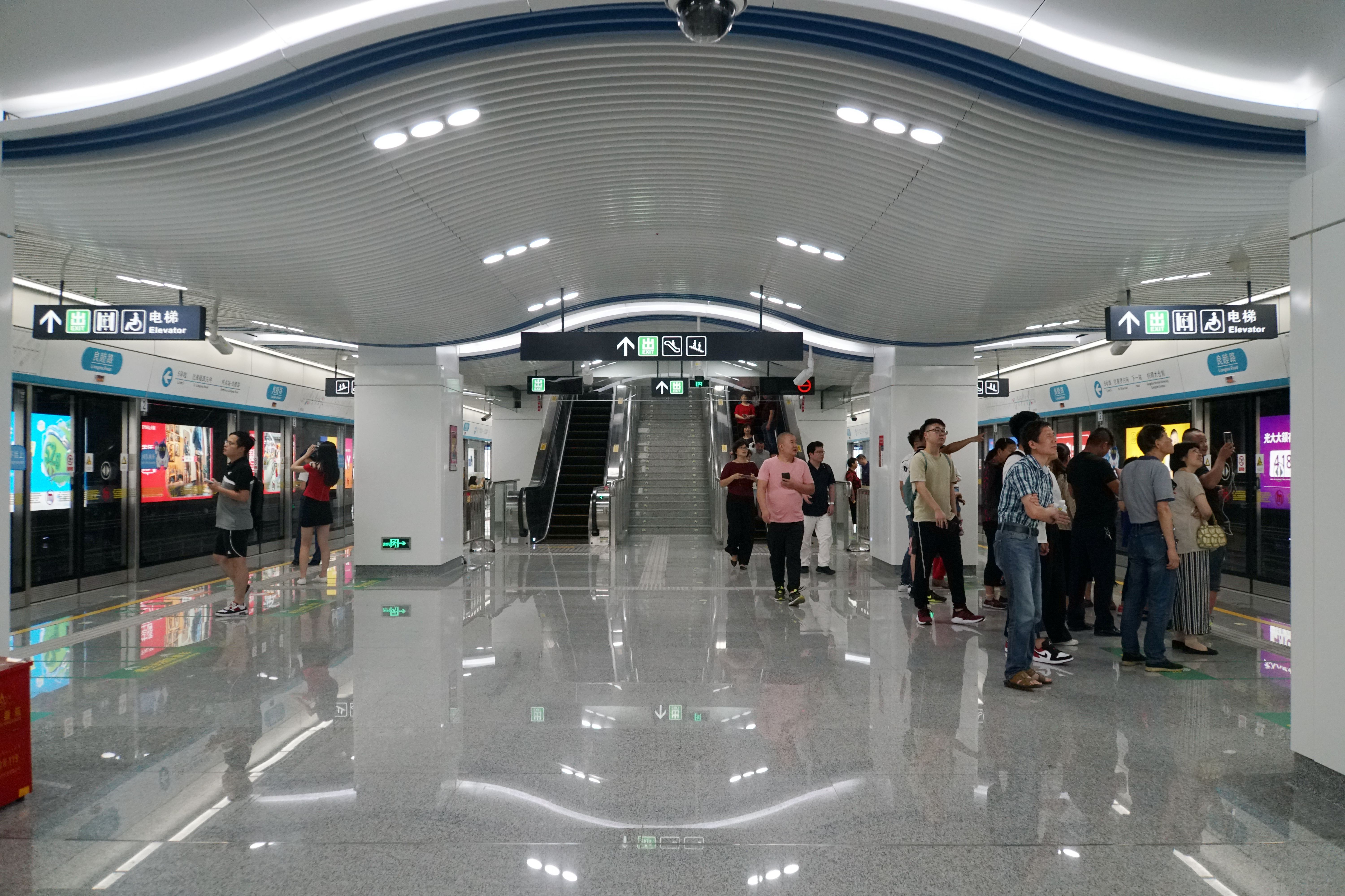 良睦路站站台